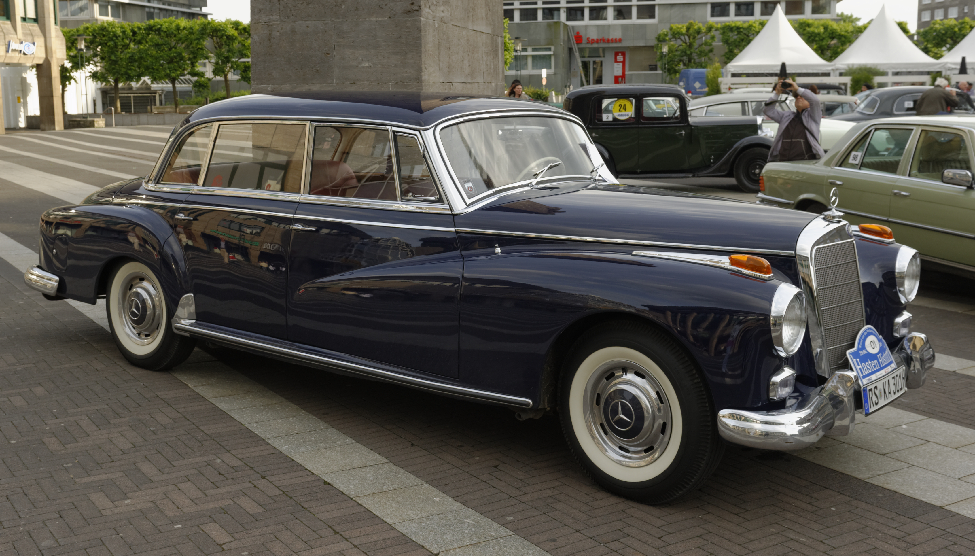 Oldtimershow in Remscheid Juni 2013